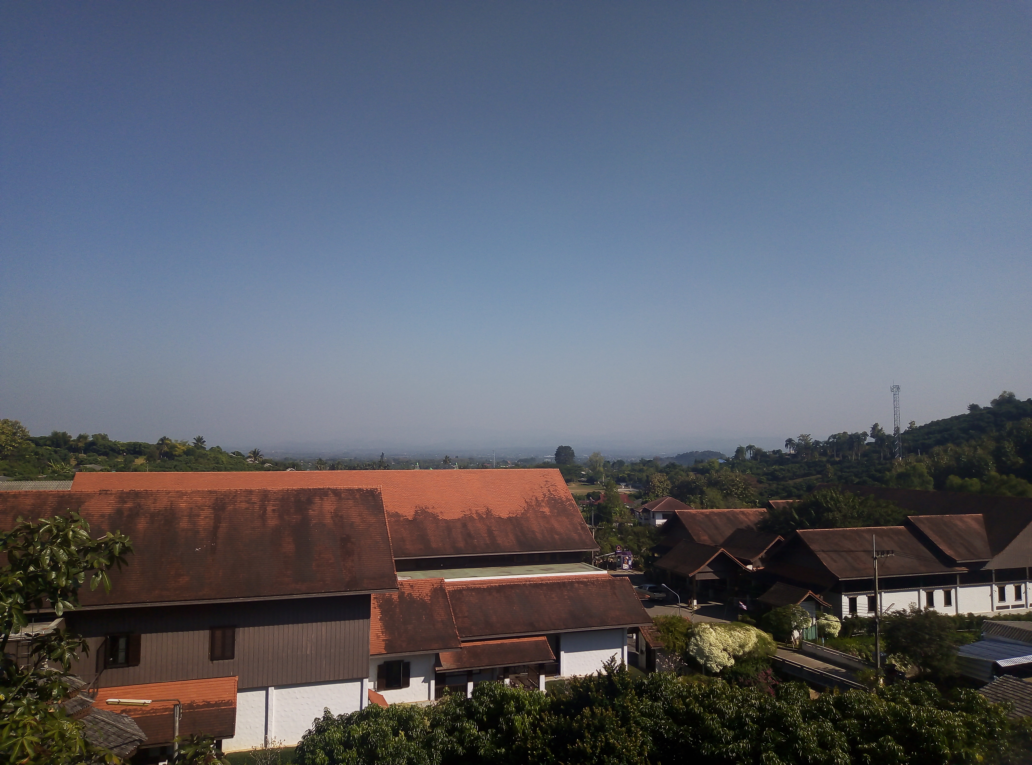 ลักษณะท้องฟ้าในช่วงหน้าแล้ง(หน้าหนาว) ในเดือนธันวาคม ที่อำเภอฝาง จังหวัดเชียงใหม่